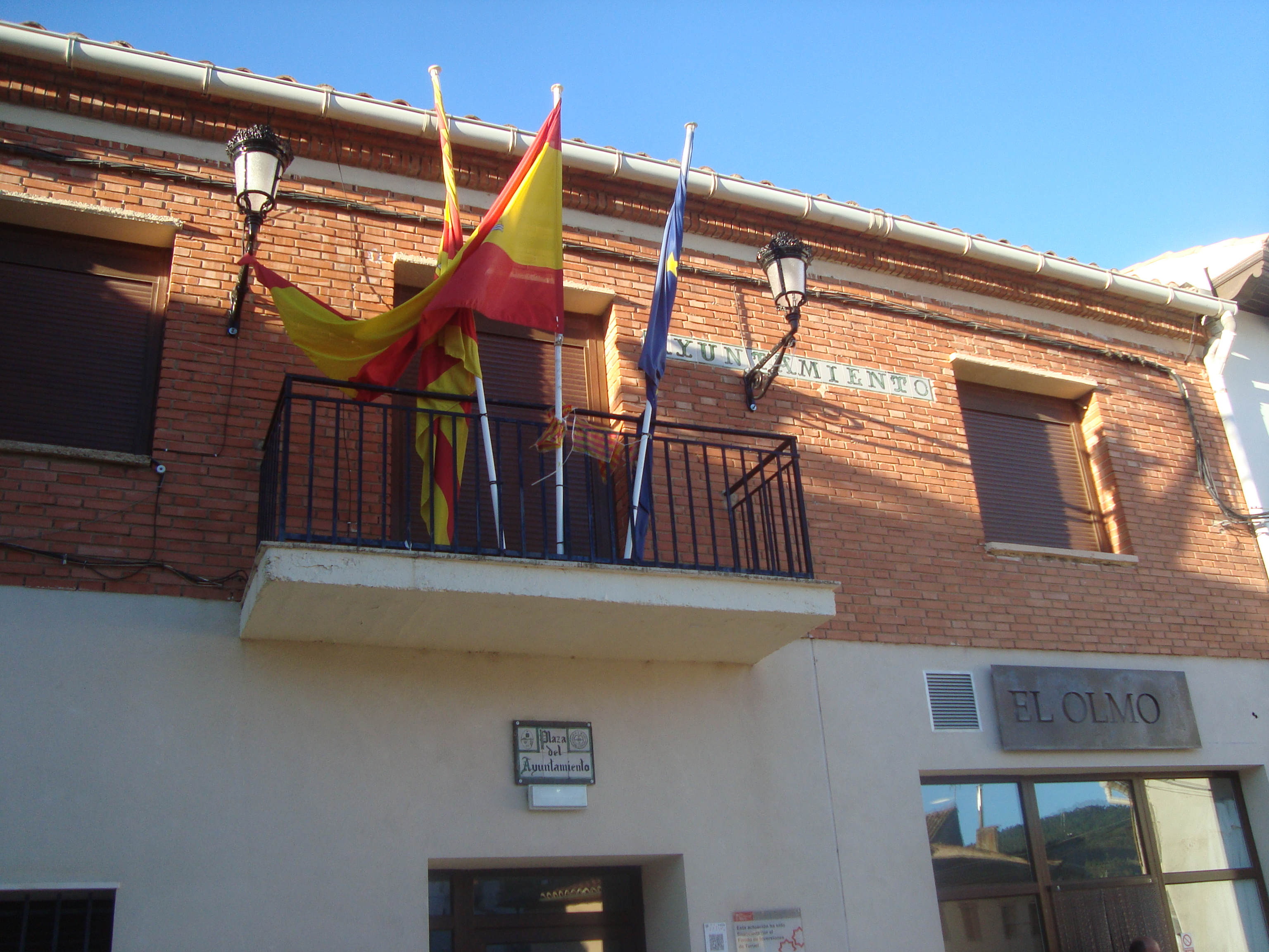 Ayuntamiento de Cubla. Cubla es un municipio de la provincia de Teruel. Pertenece a la comarca Comunidad de Teruel. Está enclavado en las faldas de la sierra de Javalambre, a 1088 m. de altitud.